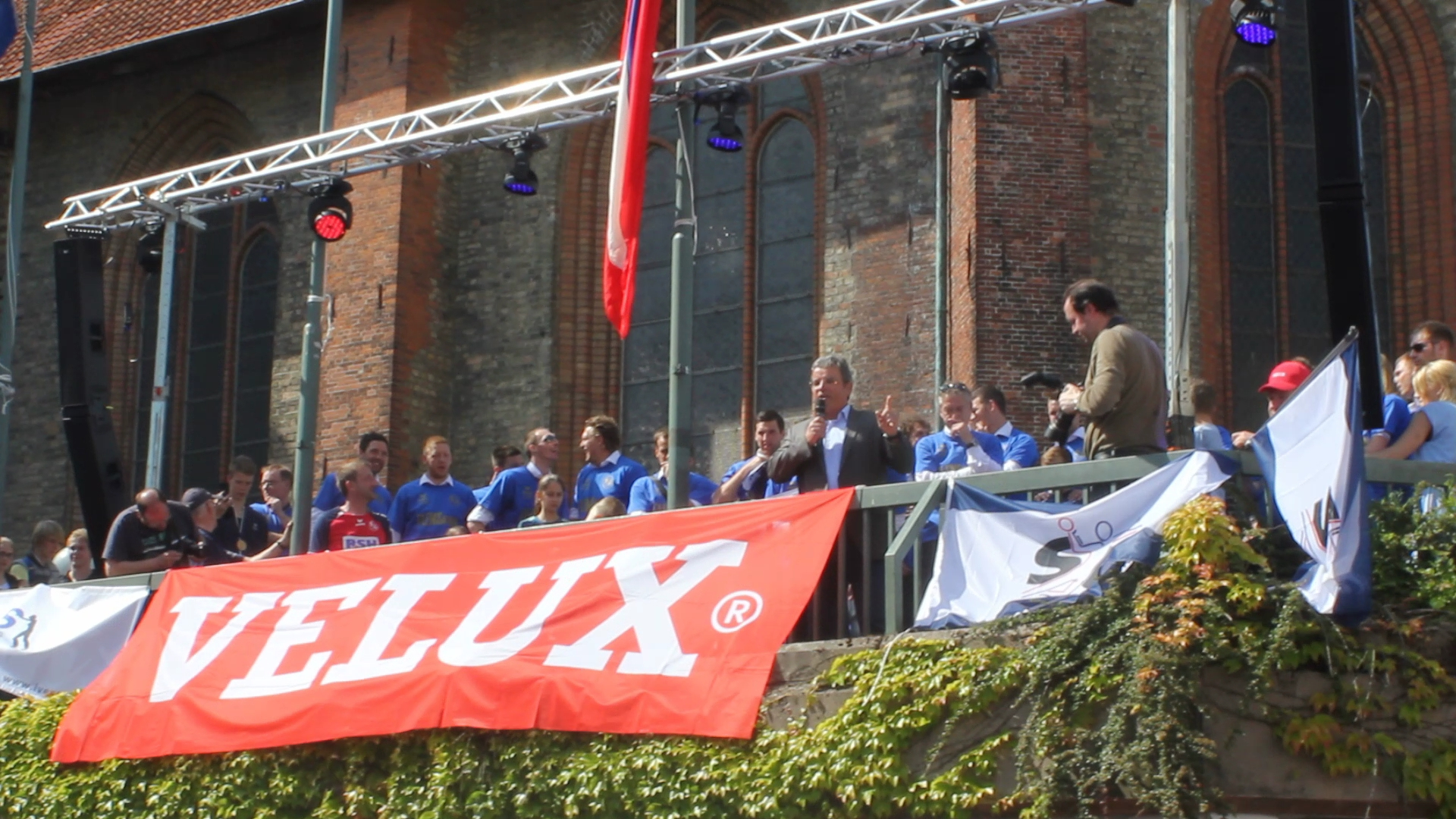 Vertreter der Gemeinde Handewitt begrüßt die SG nach ihrem Sieg auf dem Südermarkt in Flensburg (2014), Bild 03